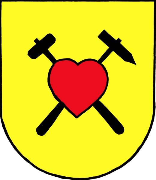 Znak obce Hostěnice